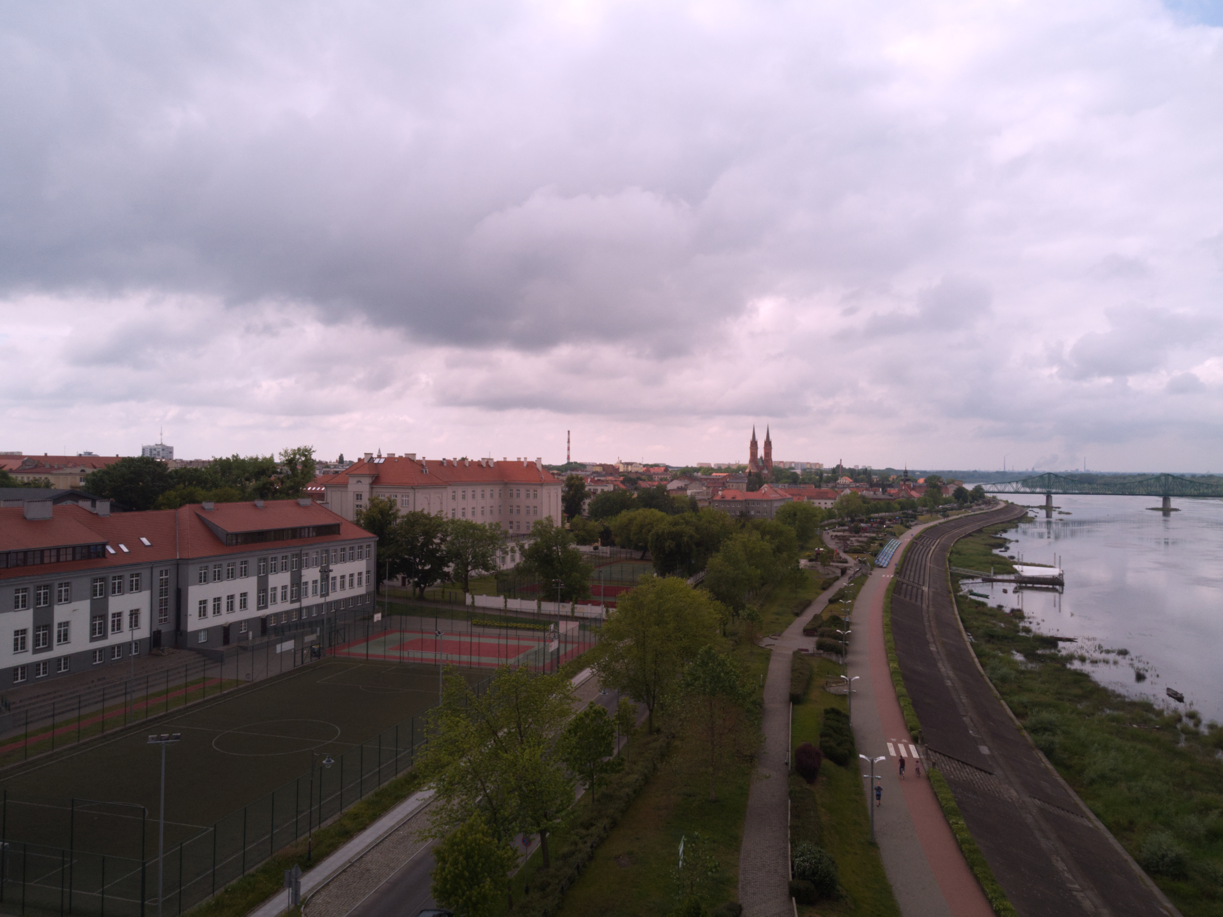 Bulwary (2020 r.)